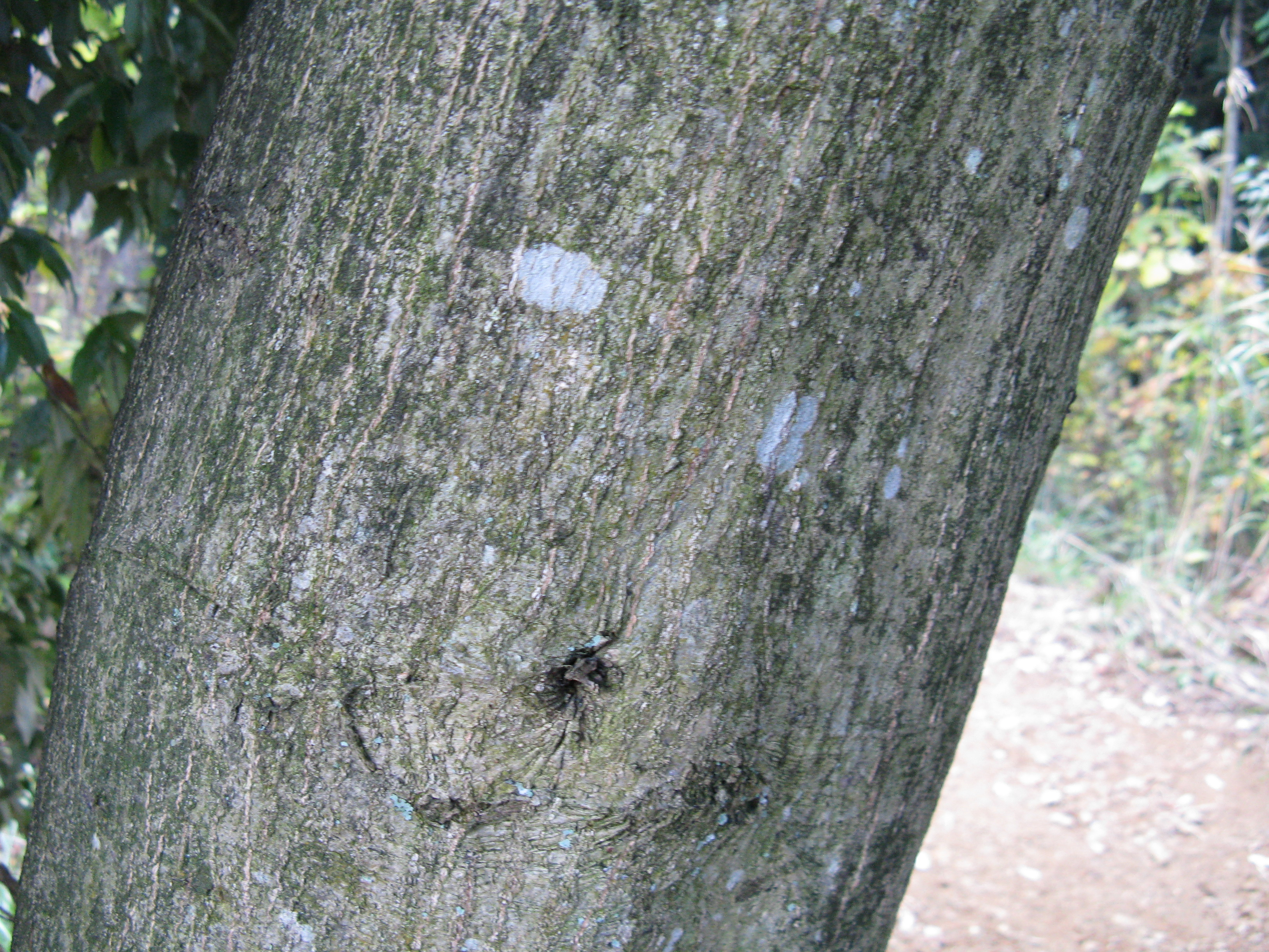 Scientific name Quercus salicina